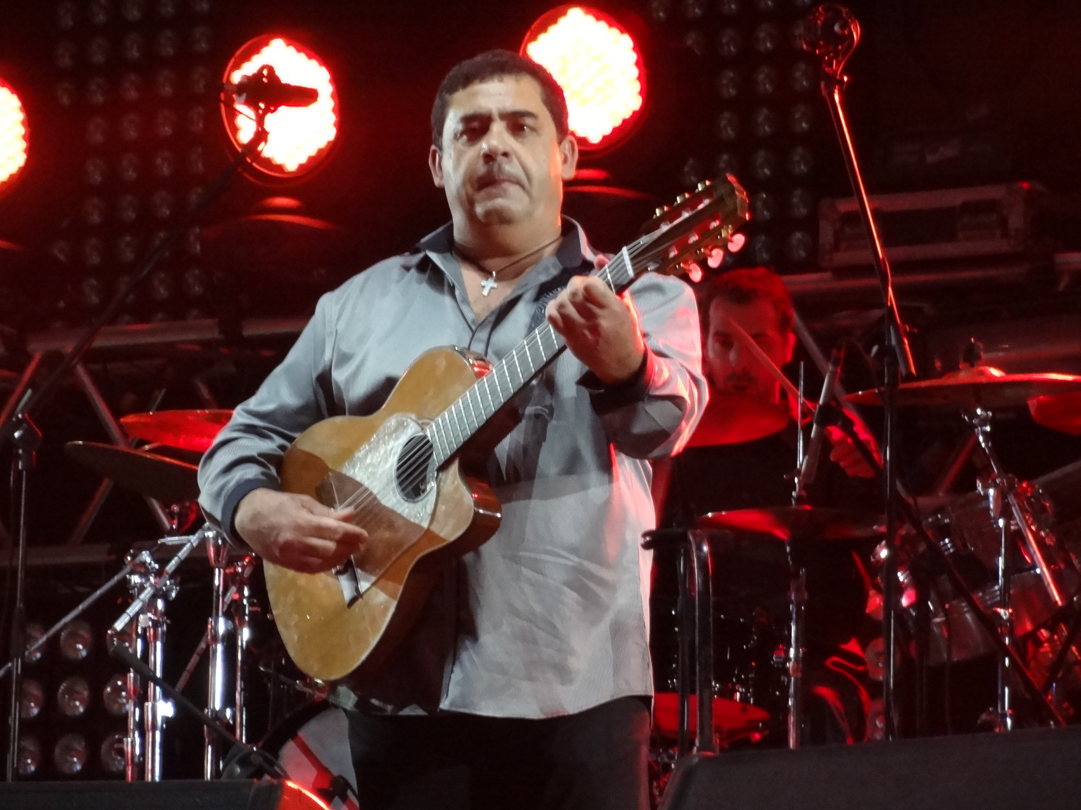 Концерт в рамках XI Международного инвестиционного форума «Сочи – 2012» .